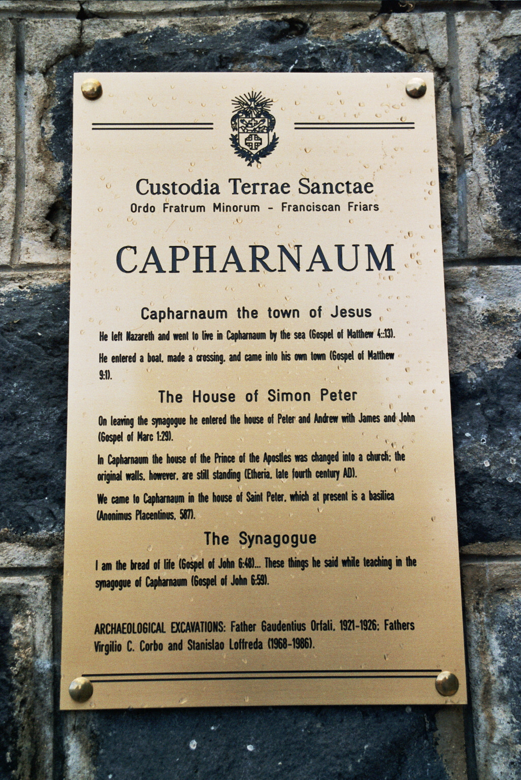 Schild am Eingang nach Kapernaum